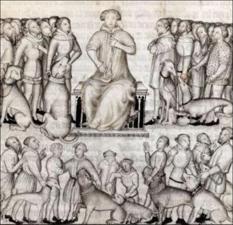 Gaston Fébus entouré de ses veneurs (détail), Livre de la Chasse, manuscrit français 619 fol.1, Bibliothèque nationale de France, Paris